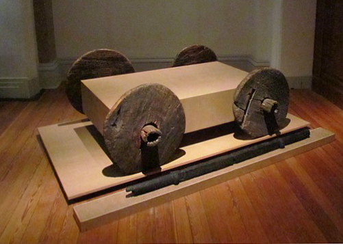 Wagenräder von Glum in der Ausstellung "Bewegte Zeiten. Archäologie in Deutschland" in Berlin